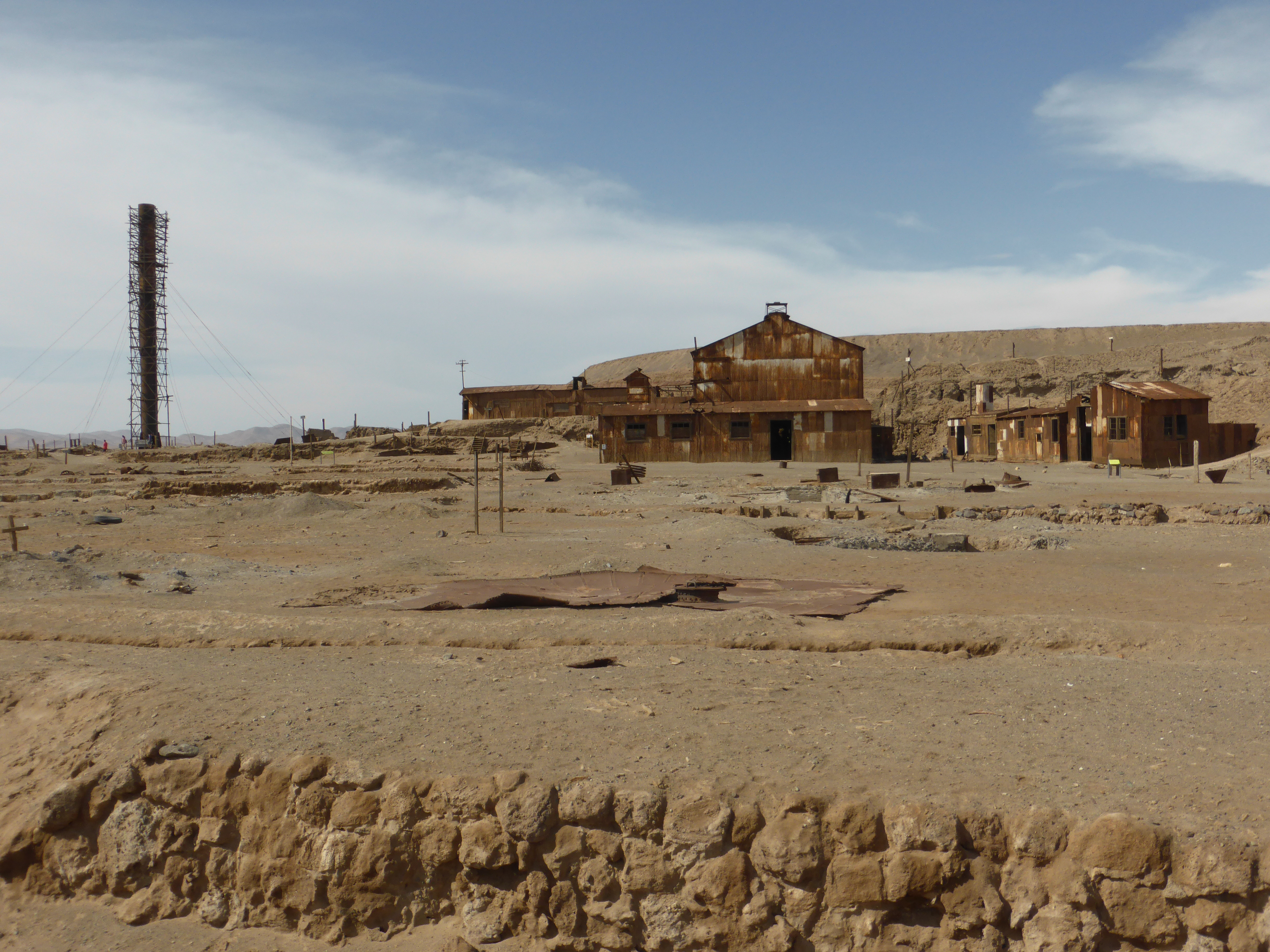 En la comuna de Pozo Almonte, de la Región de Tarapacá, se encuentra la antigua oficina salitrera Santiago Humberstone. Actualmente es un museo.